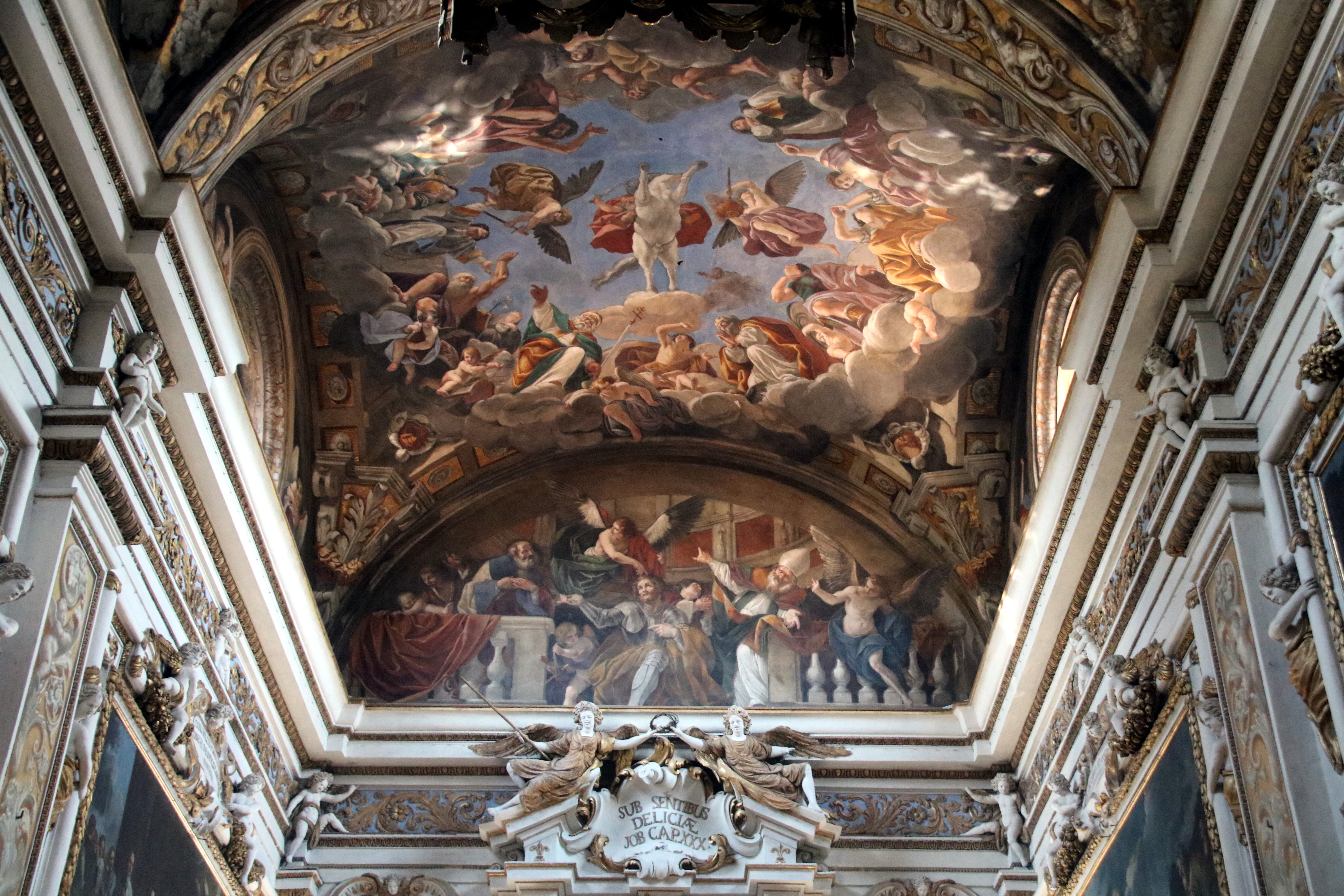 basilica di Sant'Antonino This is a photo of a monument which is part of cultural heritage of Italy.